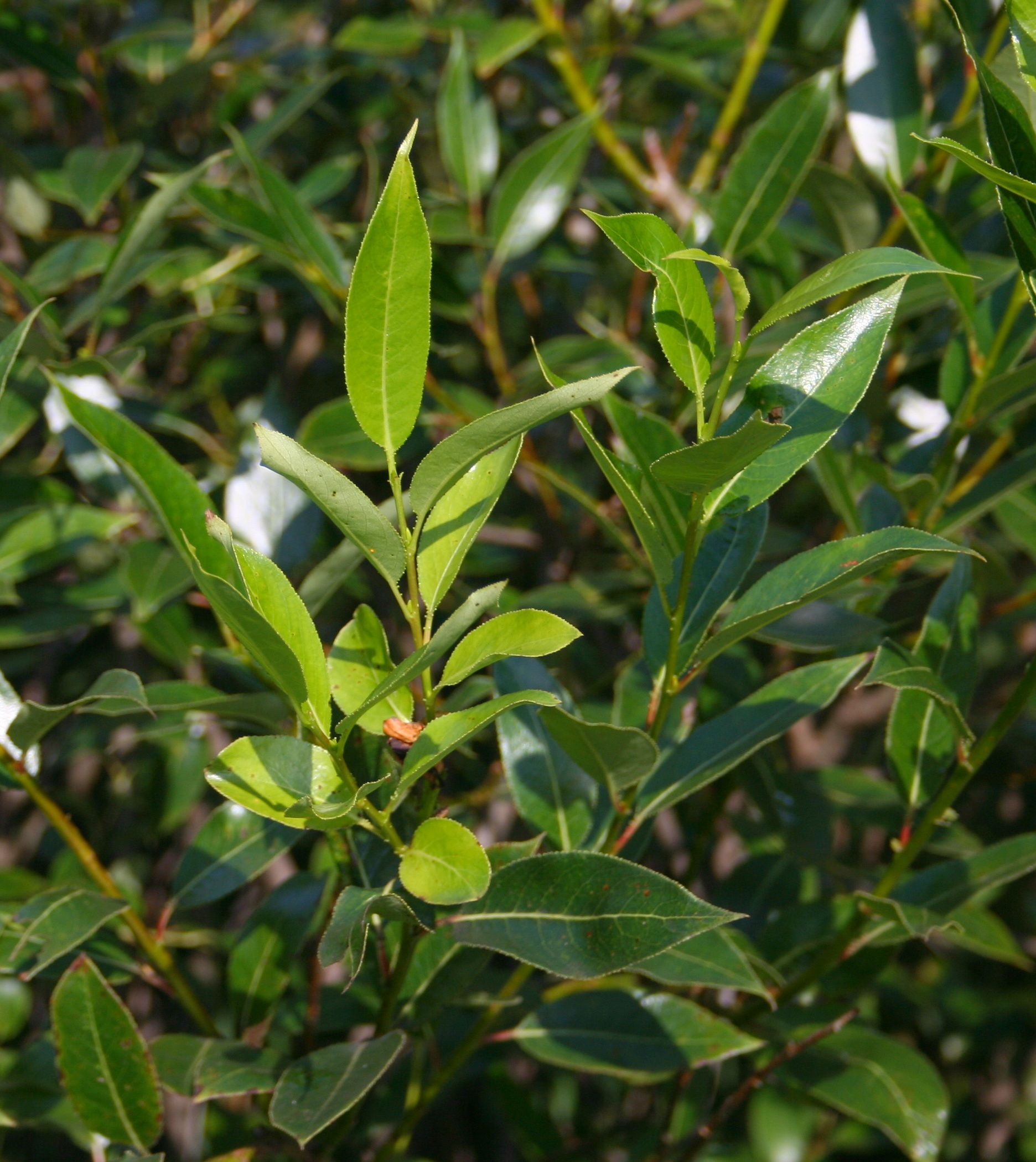 Krzew do identyfikacji, okolice Lipska.